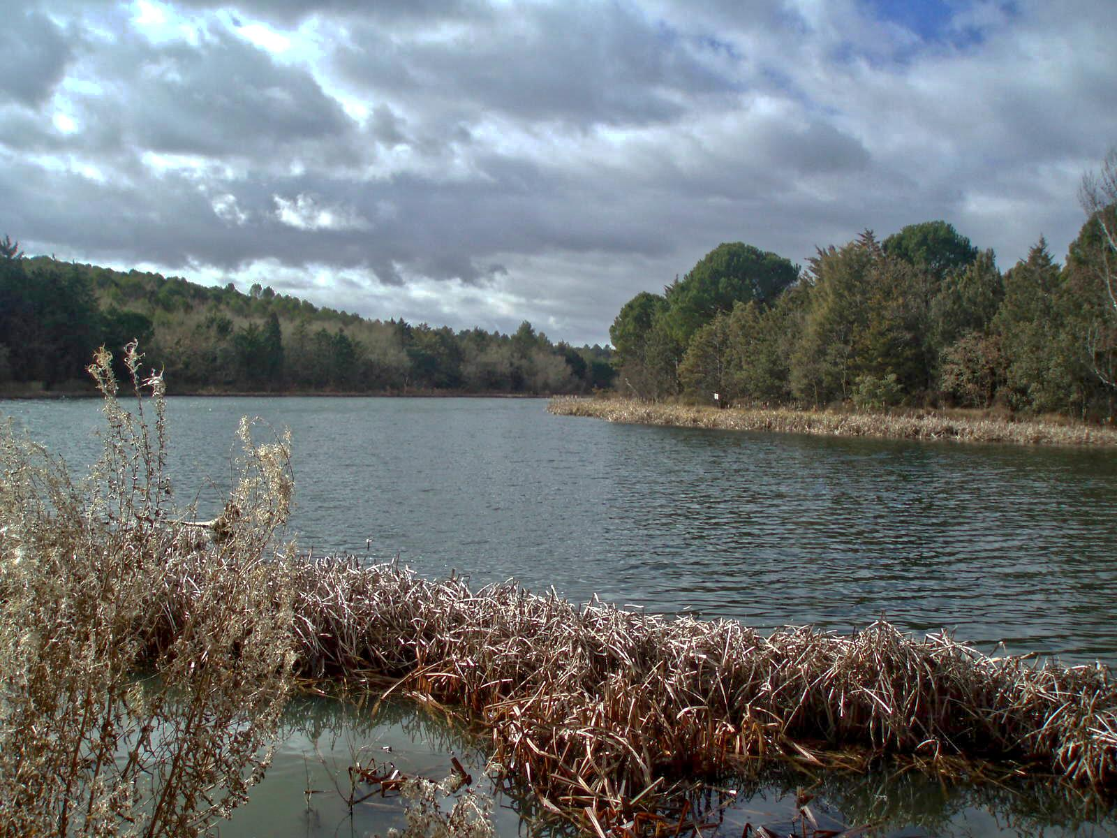 Embalse del Río Bajoz. Pantano de La Santa Espina